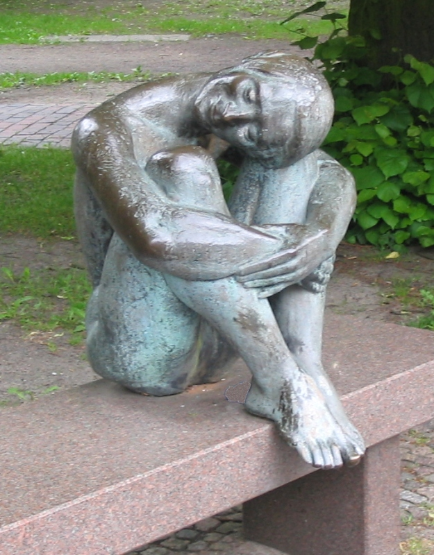 Skulptur „Die Sitzende“ von August Martin Hoffmann auf einer Bank vor der Schelfkirche St. Nikolai in Schwerin (Germany), Schelfstadt